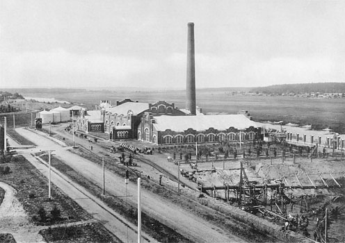 136. Рублевская насосная станцiя. Машинное зданiе.